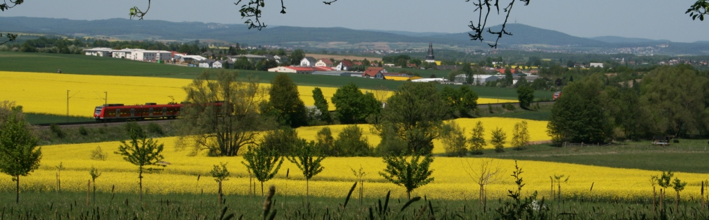 Der „Mittelhessen-Express“ der Deutschen Bahn zwischen Gießen und Frankfurt, im Hintergrund Langgöns und der Dünsberg